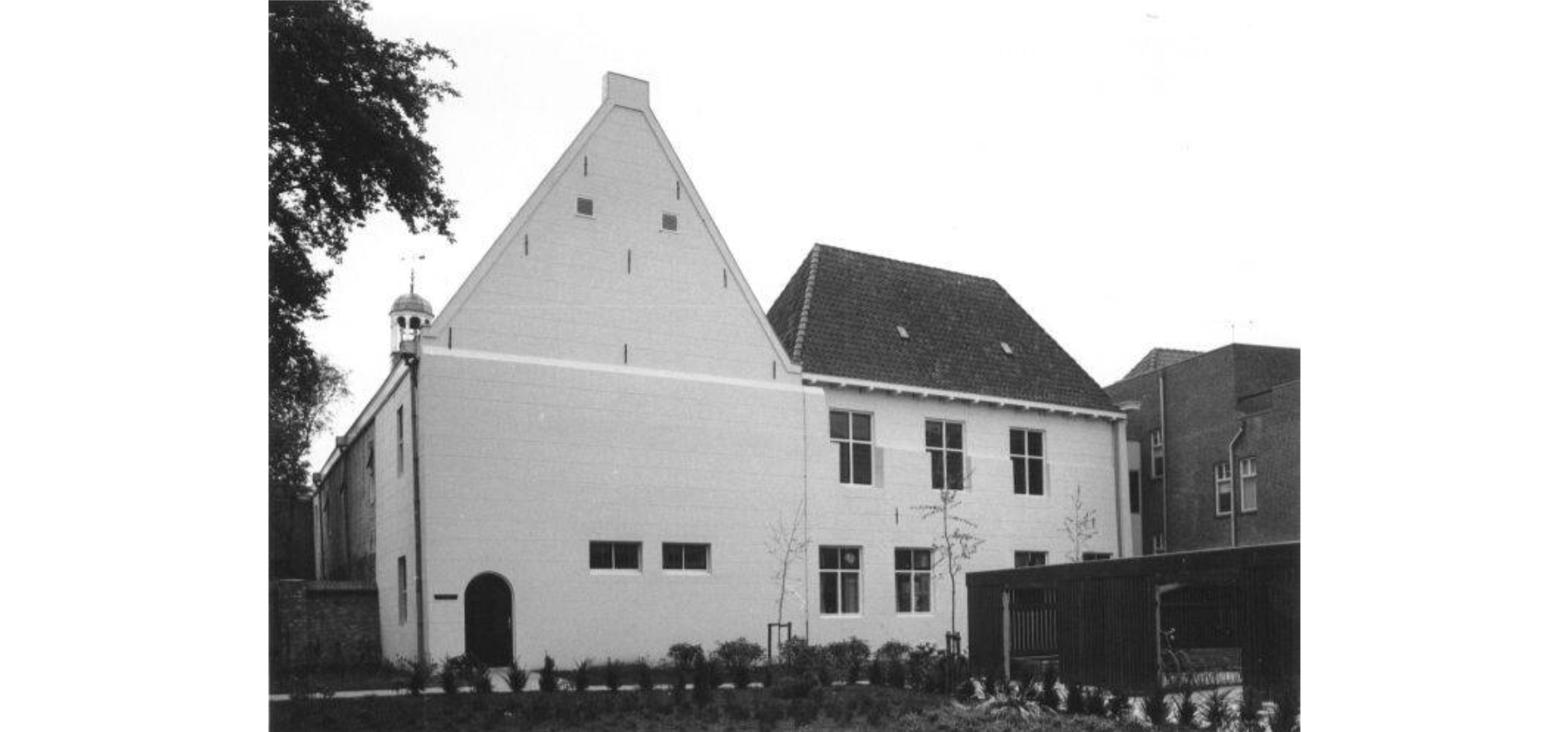 Nieuw aangebouwd gedeelte van het Psychiatrisch Ziekenhuis / GGZ in Franeker. Het oude pand behoorde vroeger tot de Franeker Academie.